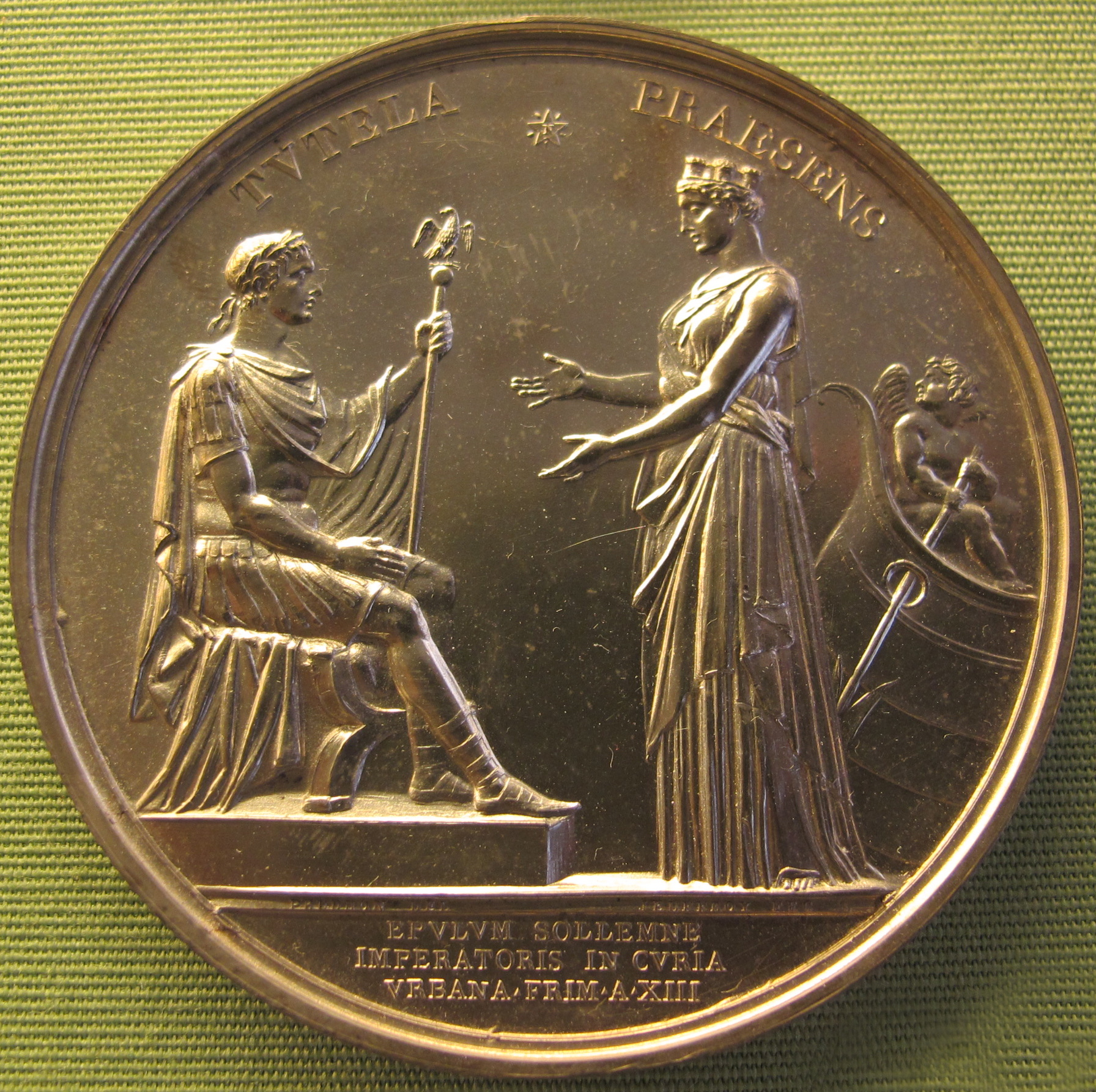 André galle e romain vincent jeoffrov, incoronazione di napoleone I